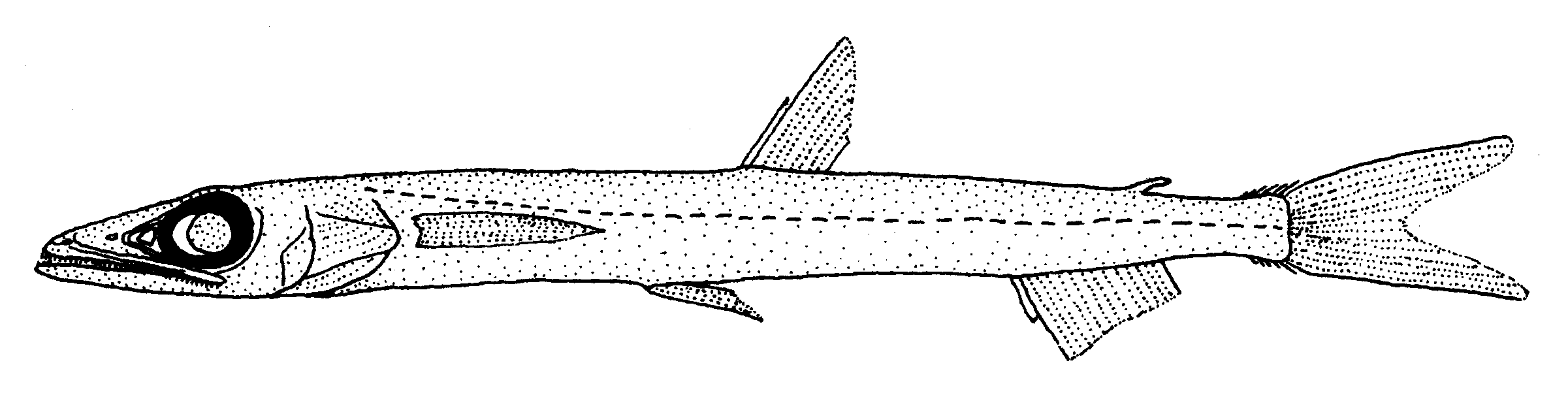 Scopelosaurus ahlstromi (no common name)